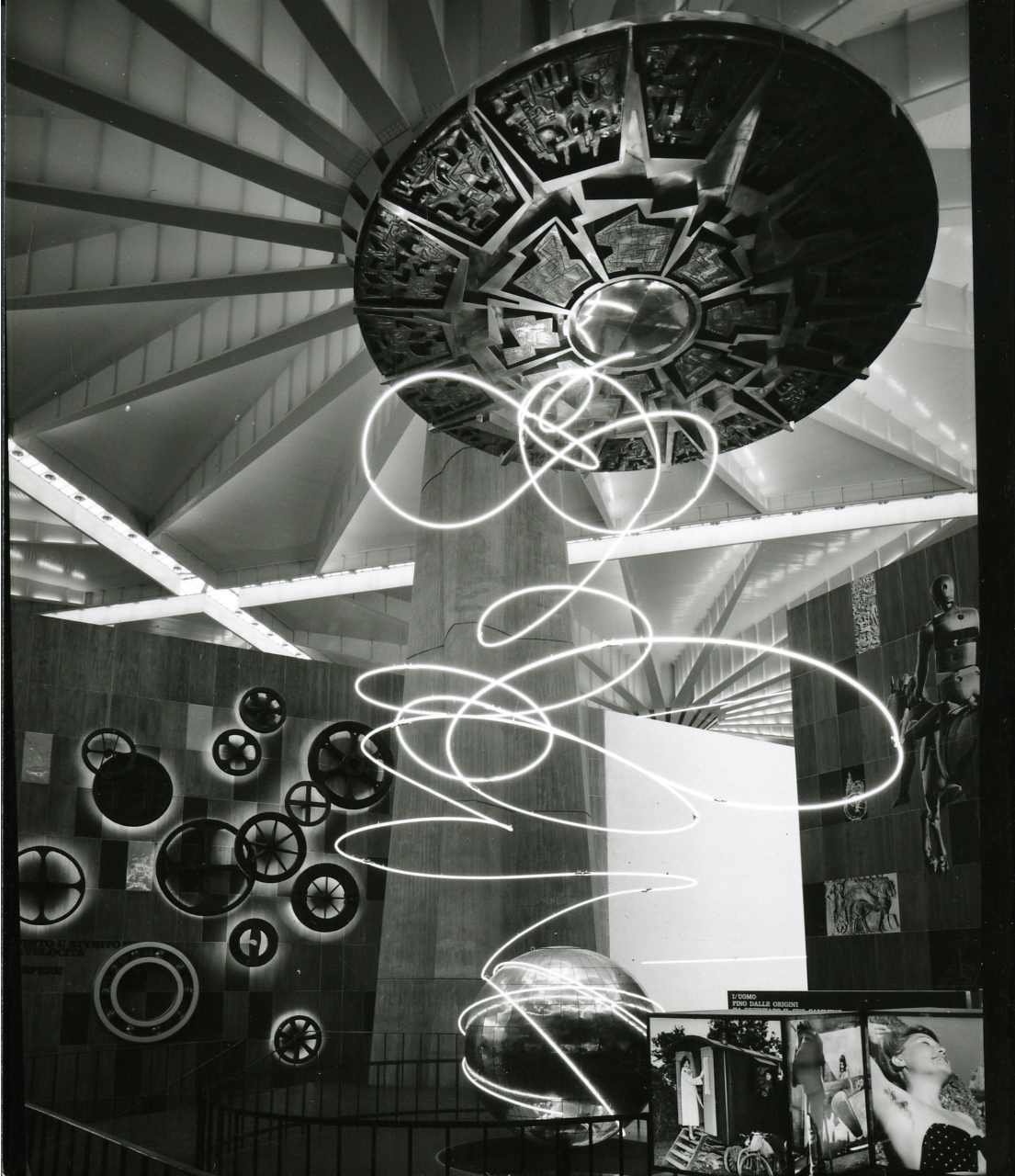 Servizio fotografico : Torino, 1961 / Paolo Monti. - Fototipi: 1 : Positivo b/n, gelatina bromuro d'argento/ carta, provino a contatto da pellicola 10x12. - ((Carta: Agfa-Brovira (ritaglio da foglio di stampa fotografica di formato A4). - Al verso: 38939. - Occasione: Esposizione. - Fonte: Camicia di Paolo Monti: III. Scritti su Monti/ Da stampare (1949-1985), presso Archivio Paolo Monti. Nella camicia "Da stampare" (contrassegnata come 03.01) ci sono ritagli di stampe fotografiche con al verso numeri di inventario, manoscritti a penna, corrispondenti ai provini a contatto [e relativi negativi] di Italia '61.